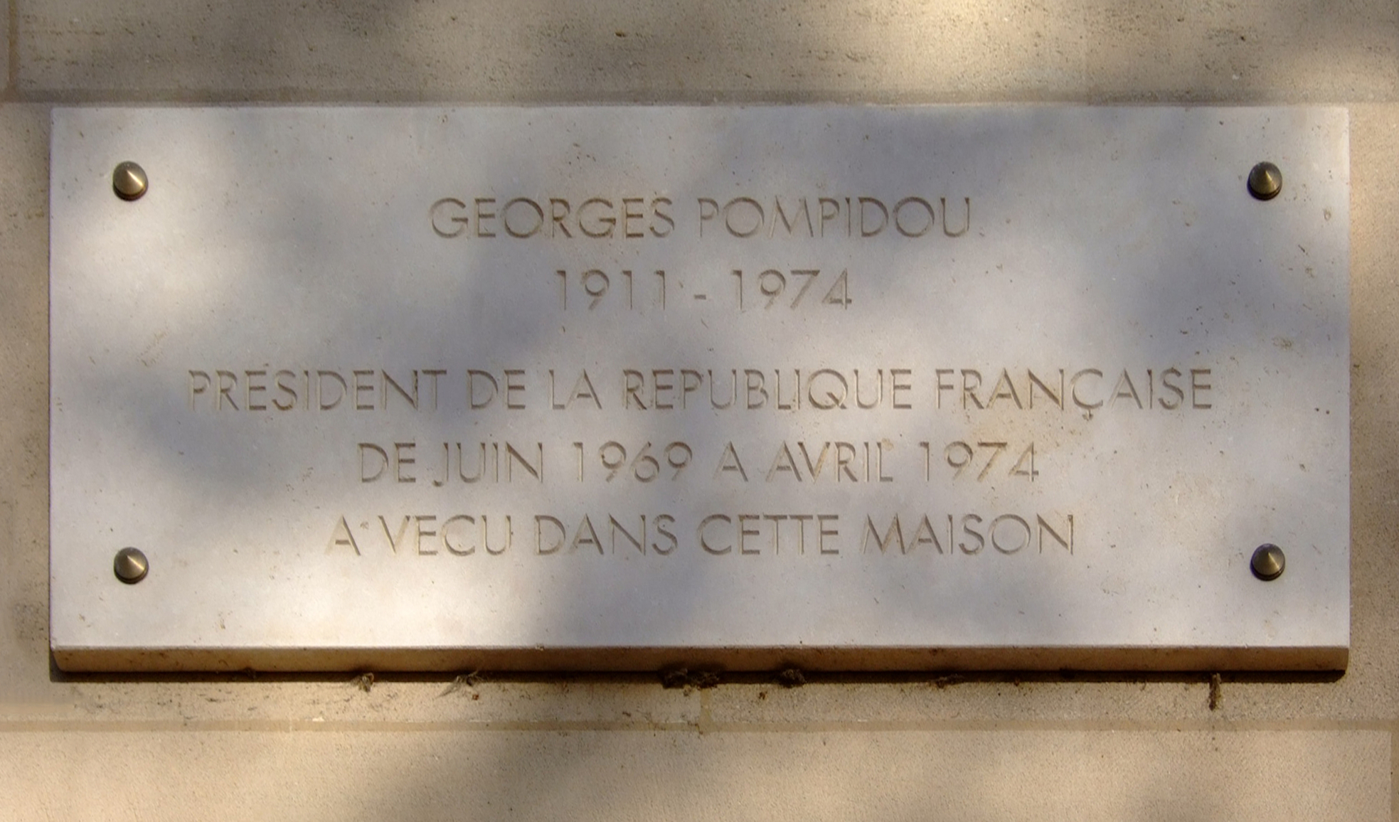 La plaque commémorative en mémoire de Georges Pompidou apposée sur le 24 quai de Béthune à Paris